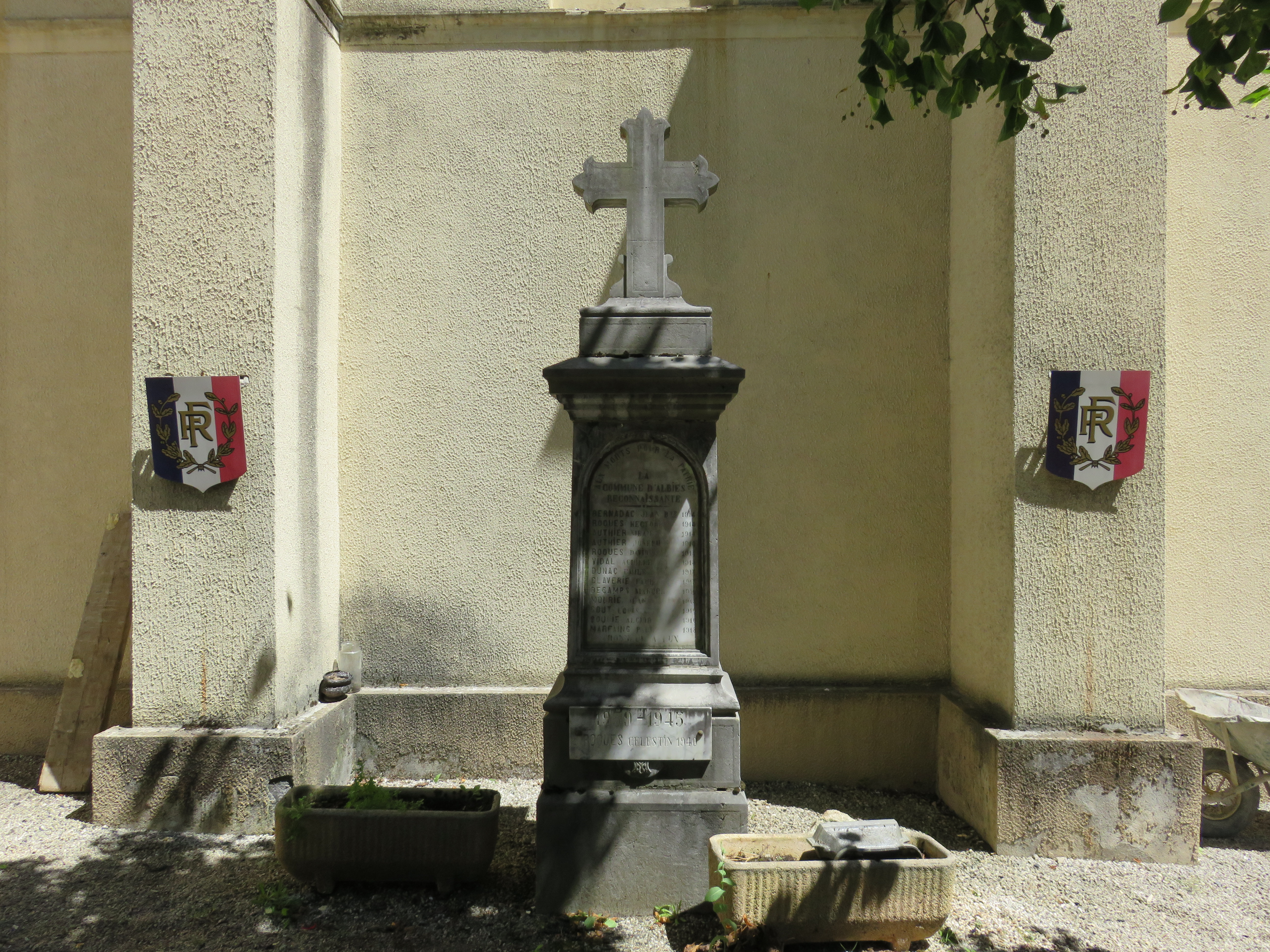 Monuments aux mort d'Albiès pour les guerres de 1914-1918 et 1939-1945. Photo sans date incrustée.